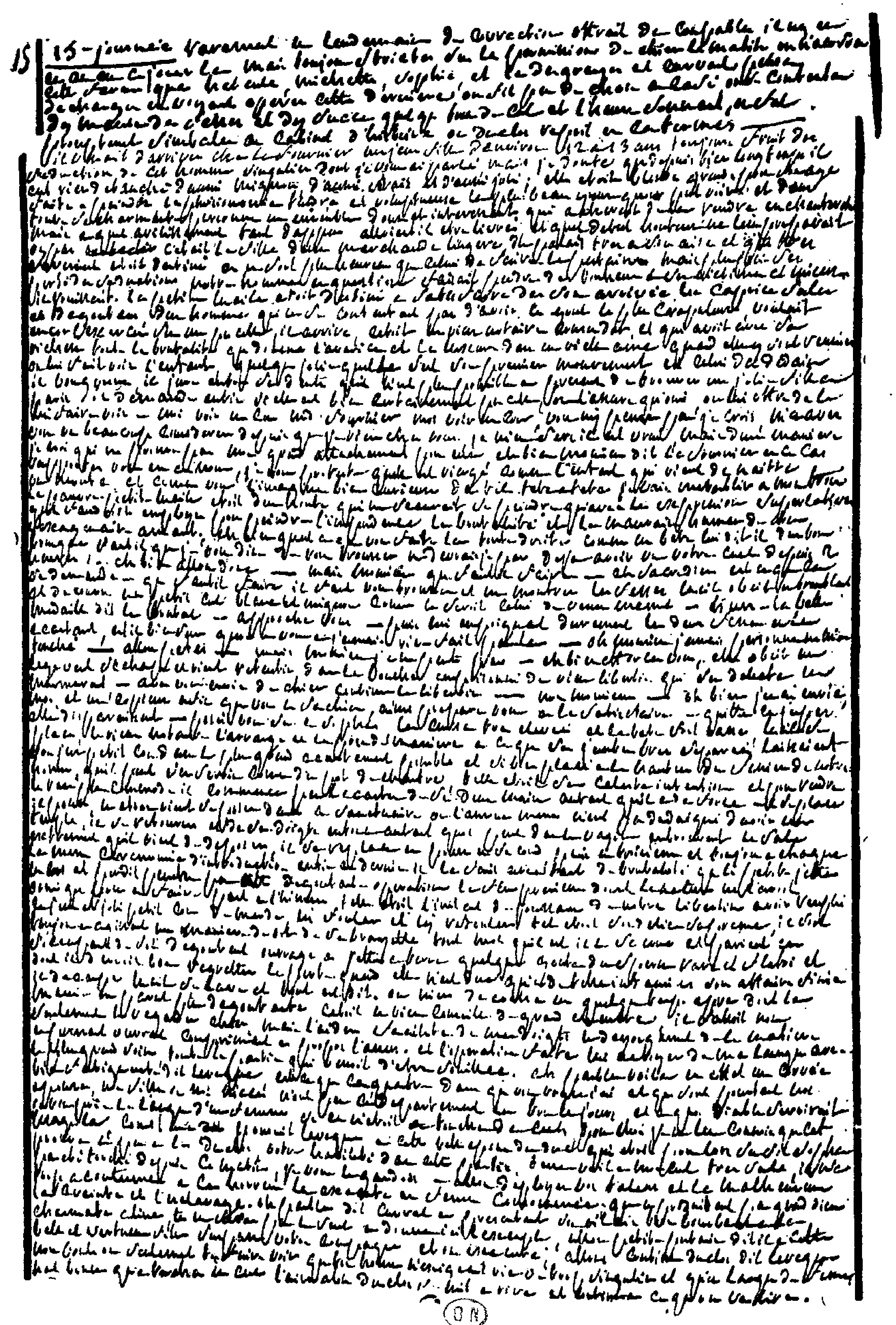 Les 120 journées de Sodome ou l'École du libertinage, par le marquis de Sade, publié pour la première fois d'apres le manuscrit original avec les annotations scientifiques par le Dr Eugen Dühren. Paris, Club des Bibliophiles, 1904. In-4° de VIII-543 pp.